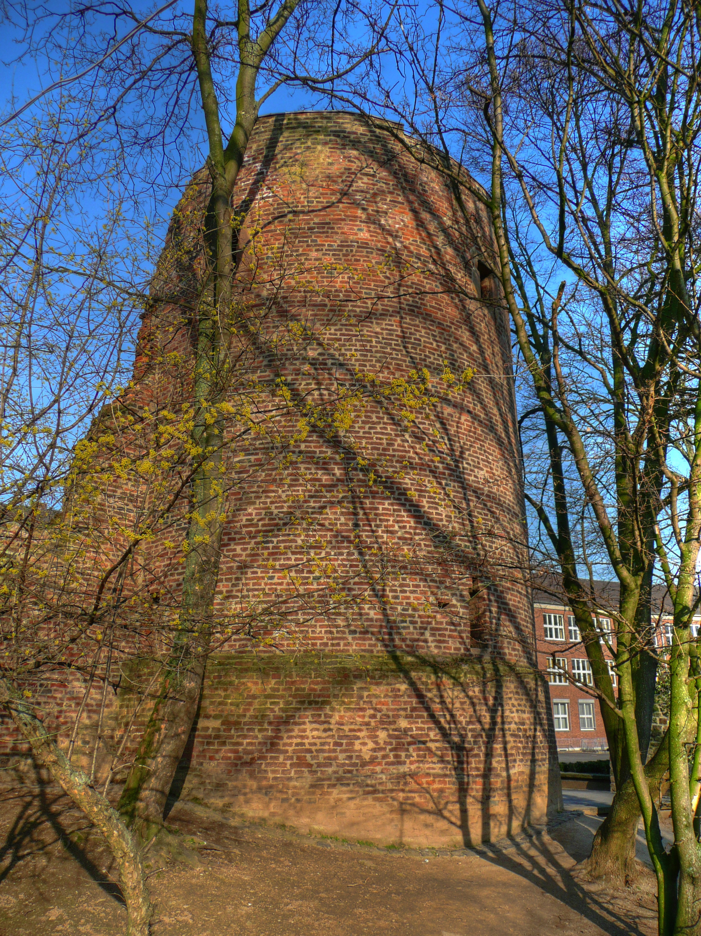 Stadtturm auf dem Gelände des Stiftischen Gymnasiums